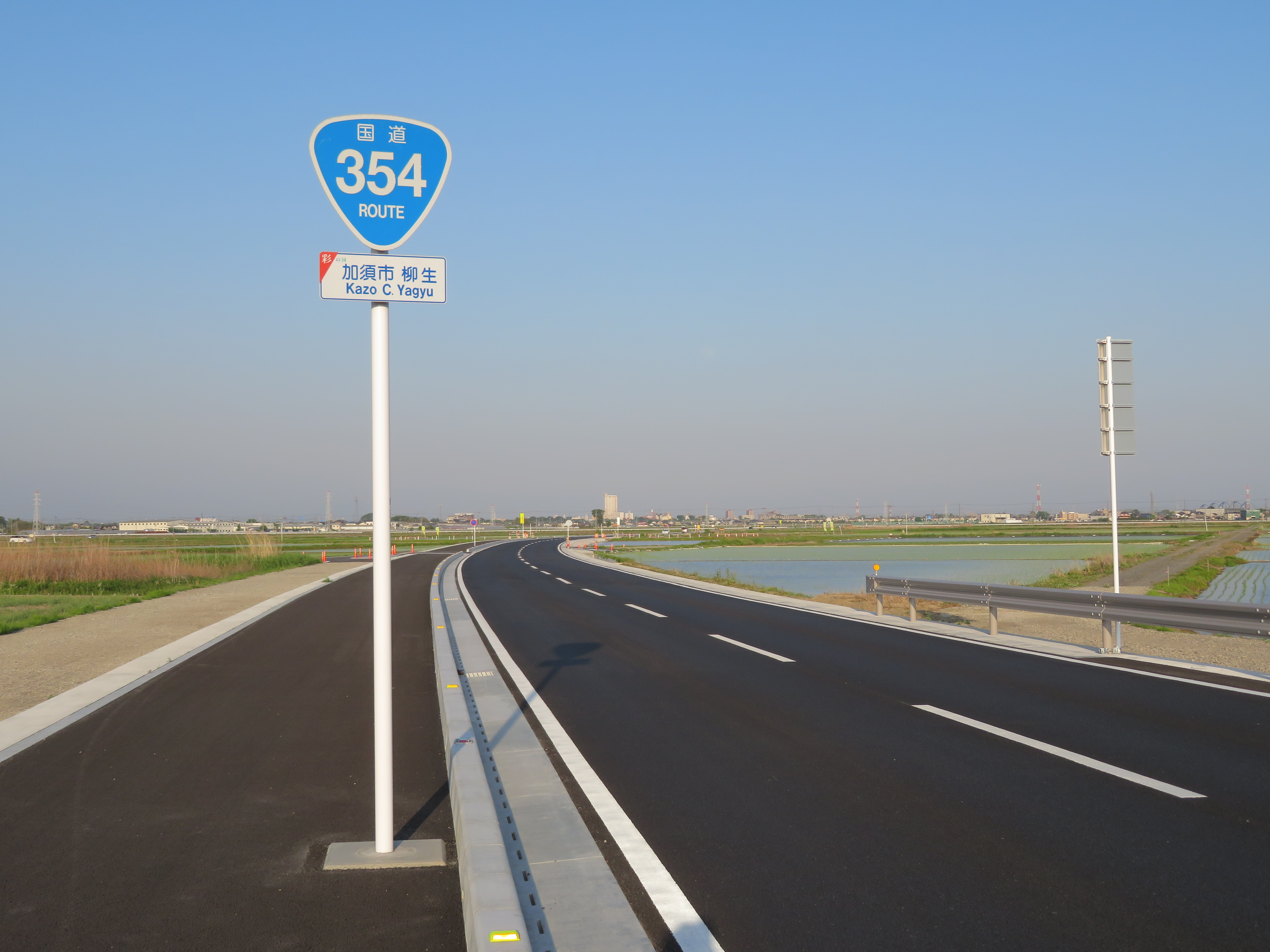 国道354号線板倉北川辺バイパス埼玉県加須市柳生付近（古河方面を撮影） Canon PowerShot SX720 HS